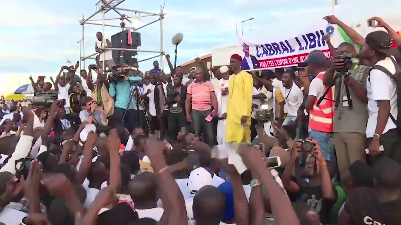 Au Cameroun, retour sur le dernier déclaration du candidat de l’opposition Cabral Libii (en jaune au centre) lors de son dernier rassemblement dans la capitale Yaoundé, avant les élections présidentielles.